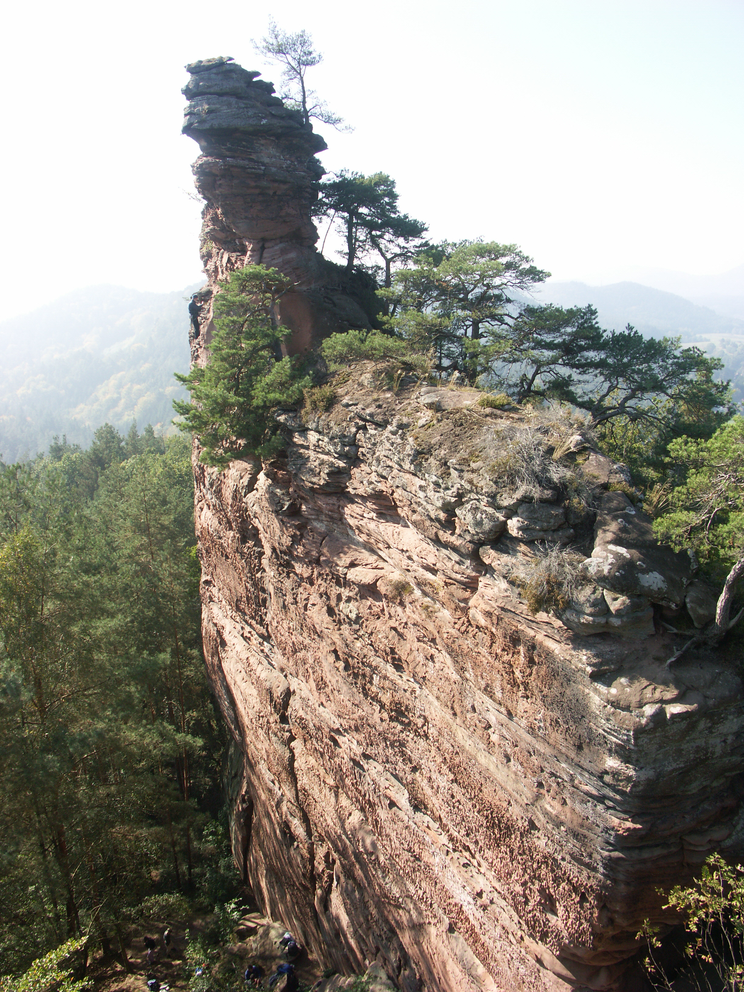 Deutschland, Rheinland-Pfalz, Dahner-Felsenland, Bärenbrunner Tal, Pferchfeldturm-Südwand